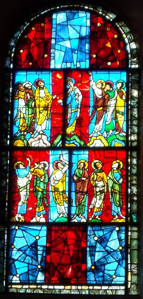 Le vitrail de l'Assomption de la Vierge, du XIIe siècle. Plus vieux vitrail du monde sur site (Cathédrale du Mans)